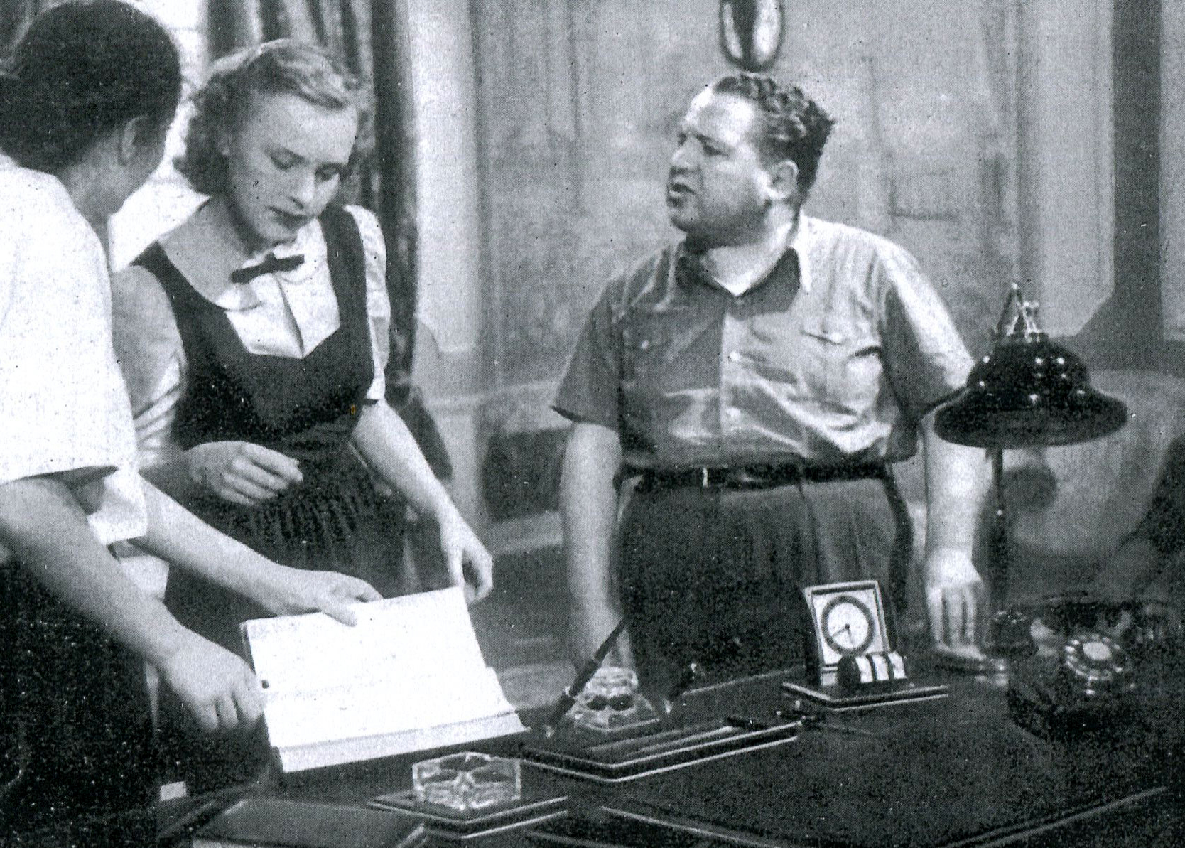 La Dilian sul set di "ore 9 lezione di chimica" (1941) con, a destra, il regista Mario Mattoli